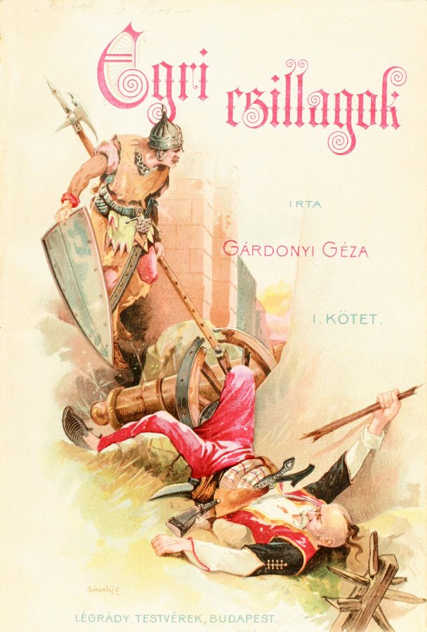 Az Egri csillagok első kiadása.